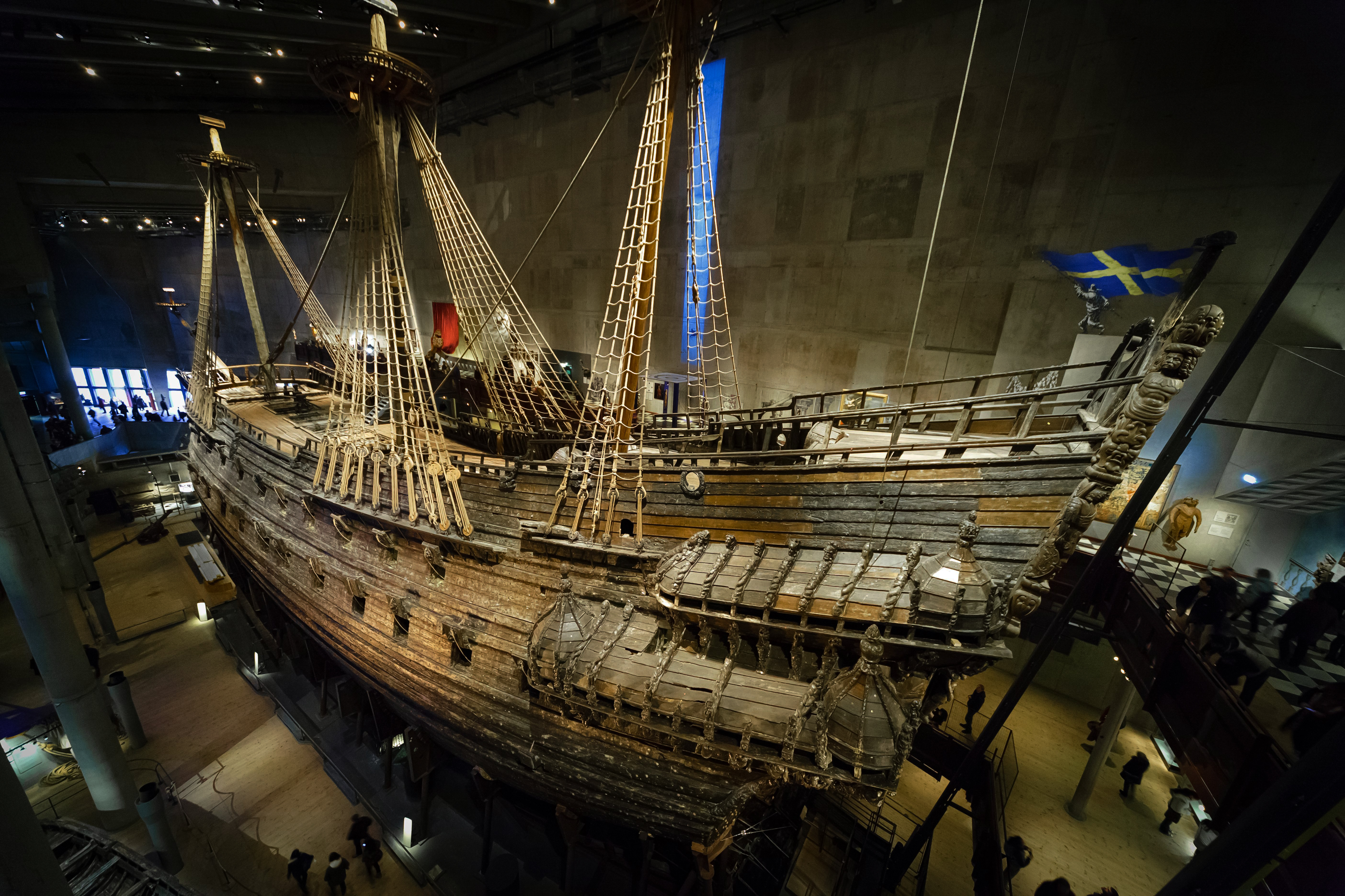 Djurgården, Östermalm, Stockholm, Sweden